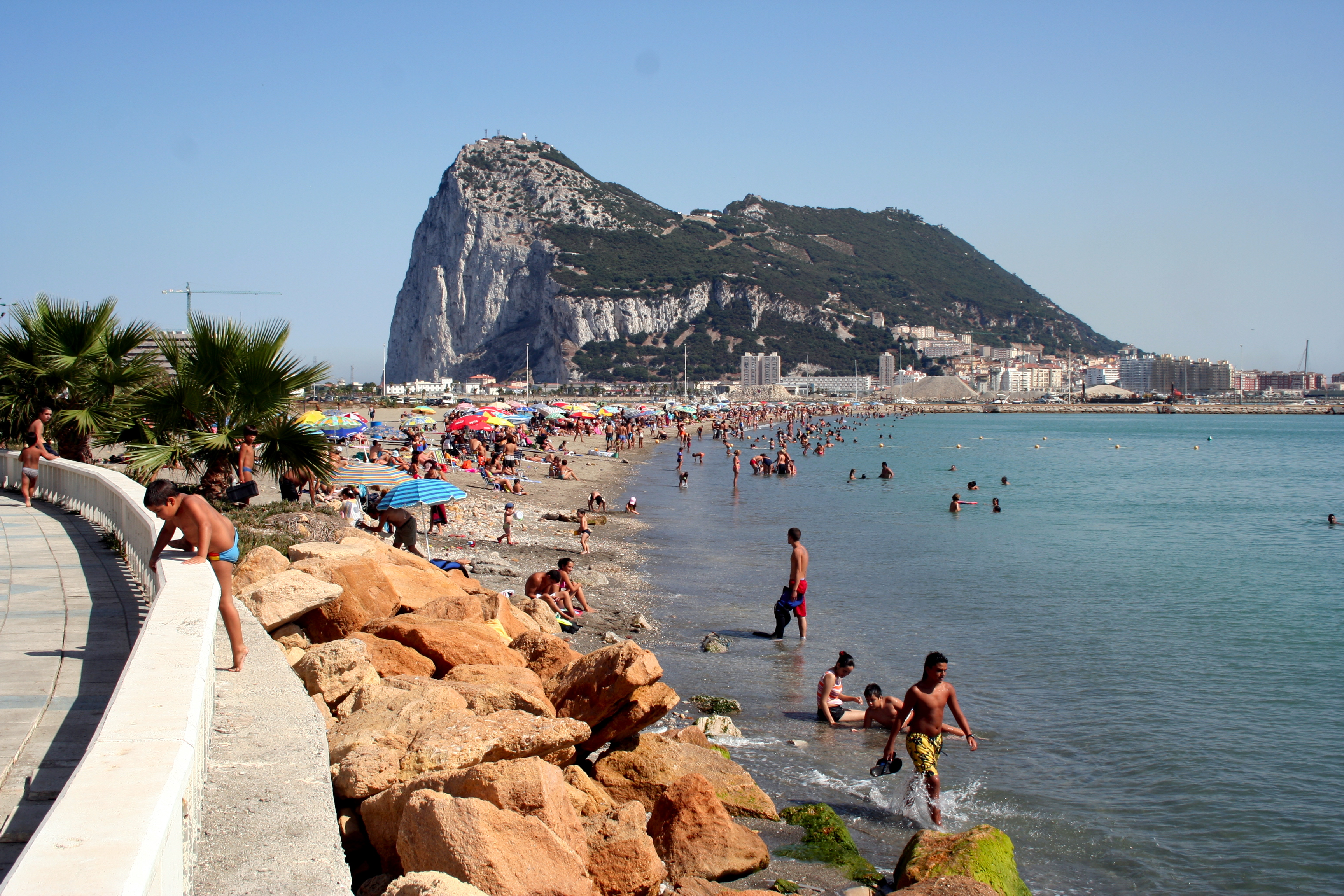 Playa de Poniente en la Línea de la Concepción. Vista del Peñón de Gibraltar al fondo.